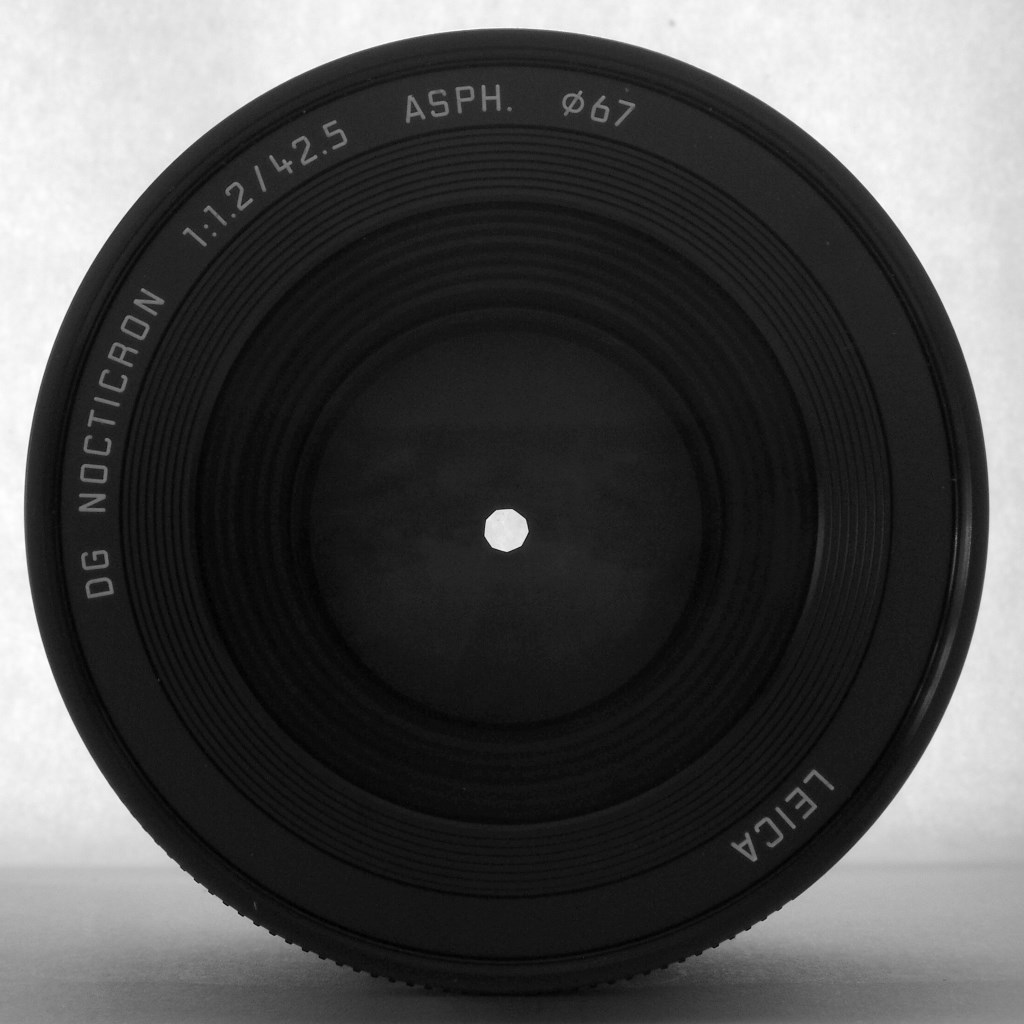 Objektiv mit verengter Irisblende zur Einstellung der Apertur (Brennweite 42,5 Millimeter, Blendenzahl 16)